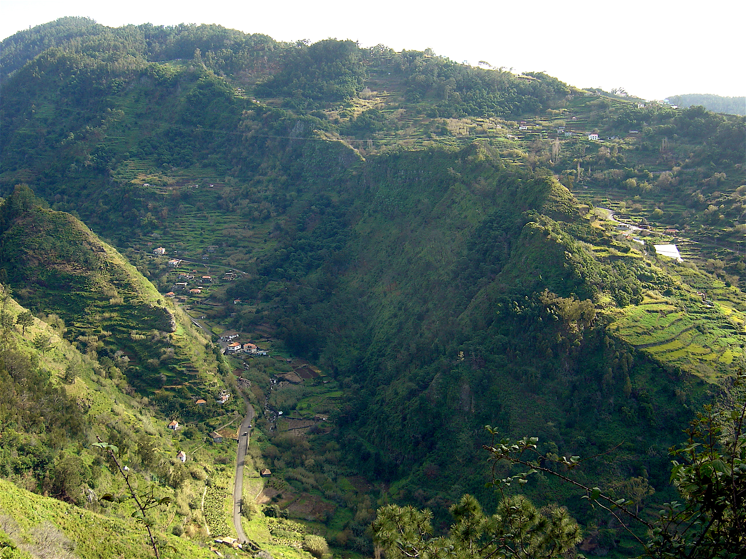 Blick auf Berghänge während auf der Levada Nova da Tabua